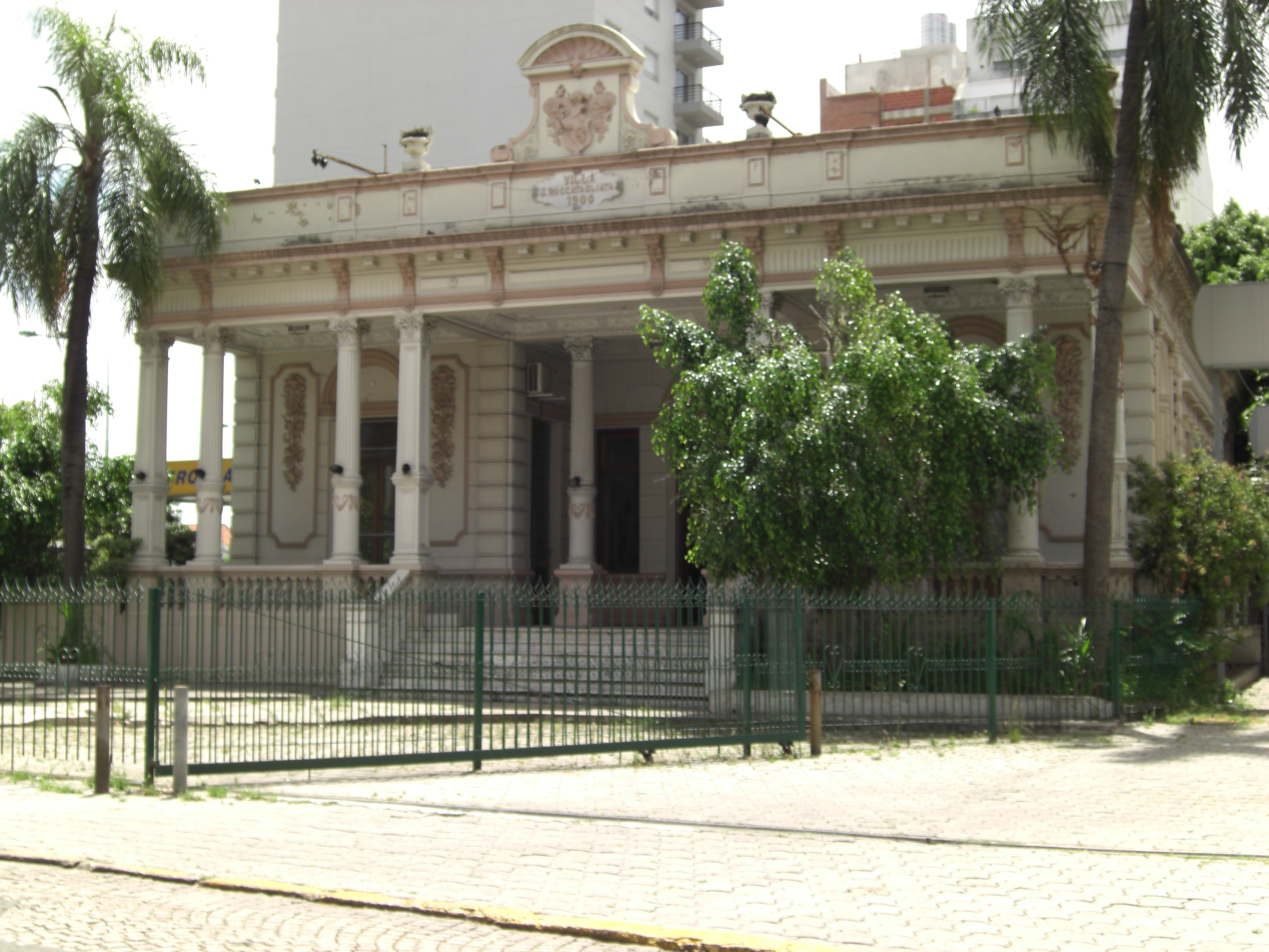 Edificación tradicional del barrio de Coghlan, Buenos Aires, Argentina